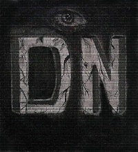 Logograma de la revista Diu Negre